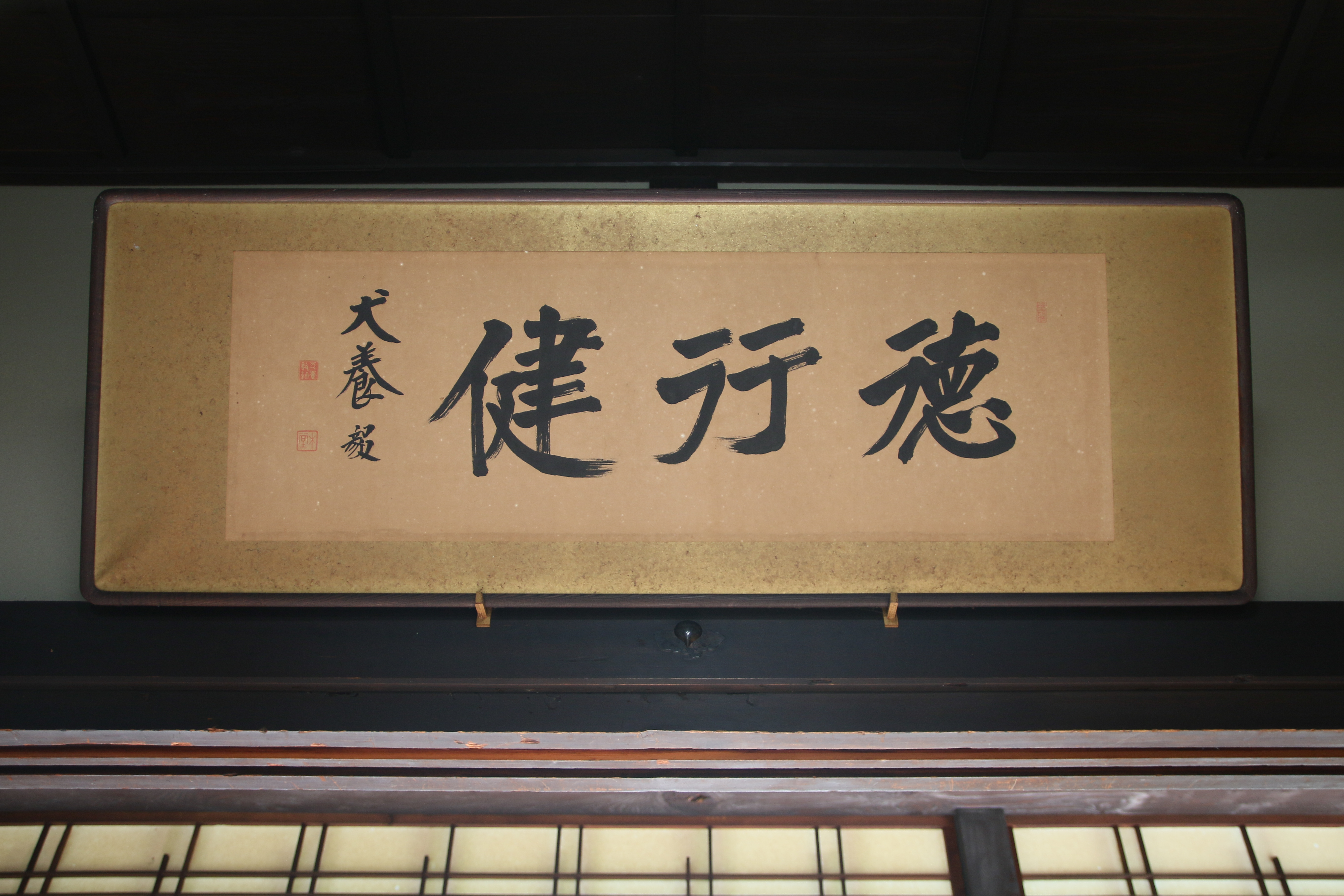 矢掛本陣の犬養毅の書